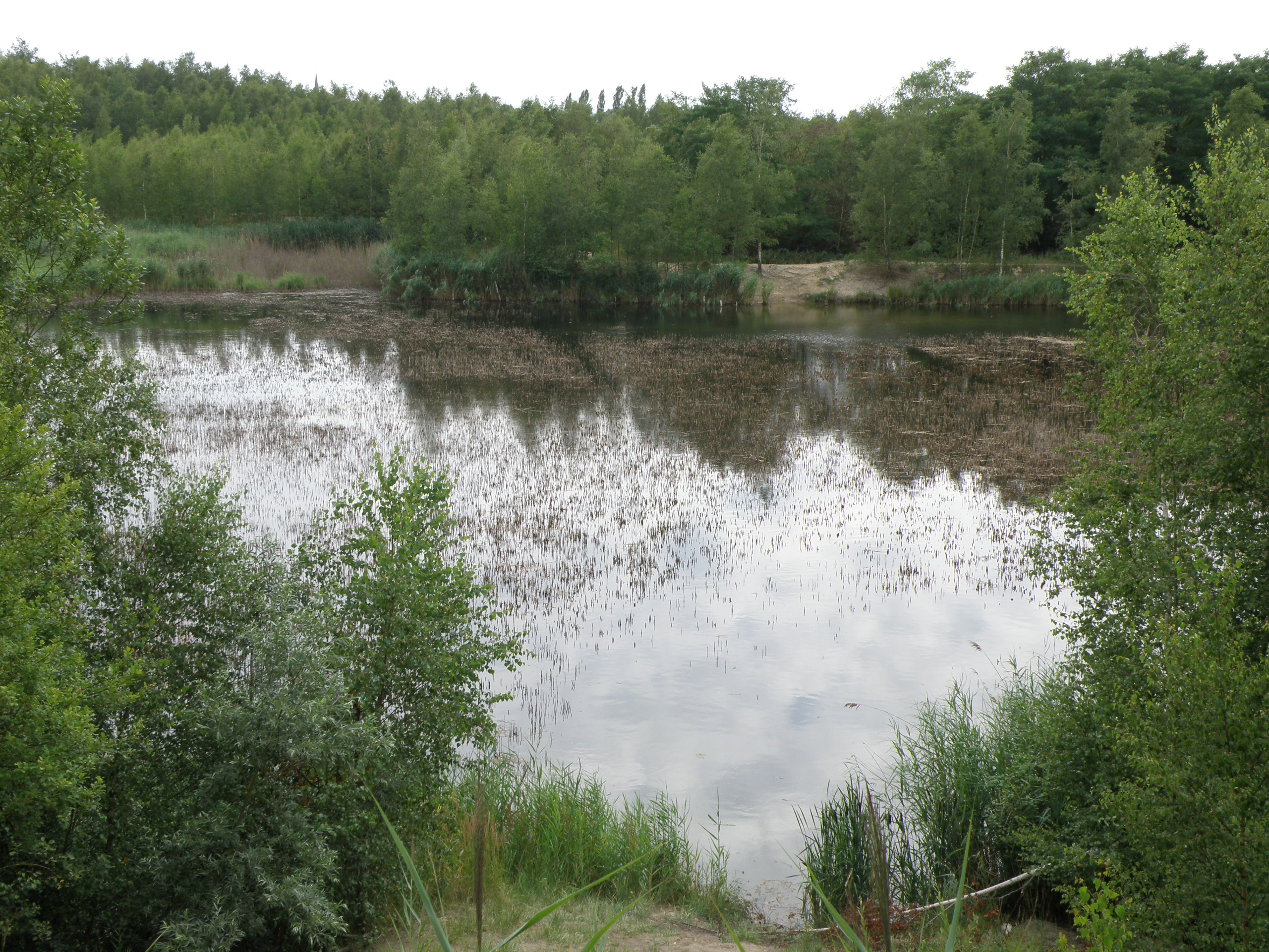 Rumst (prov. Antwerpen, België). Kleiputten.